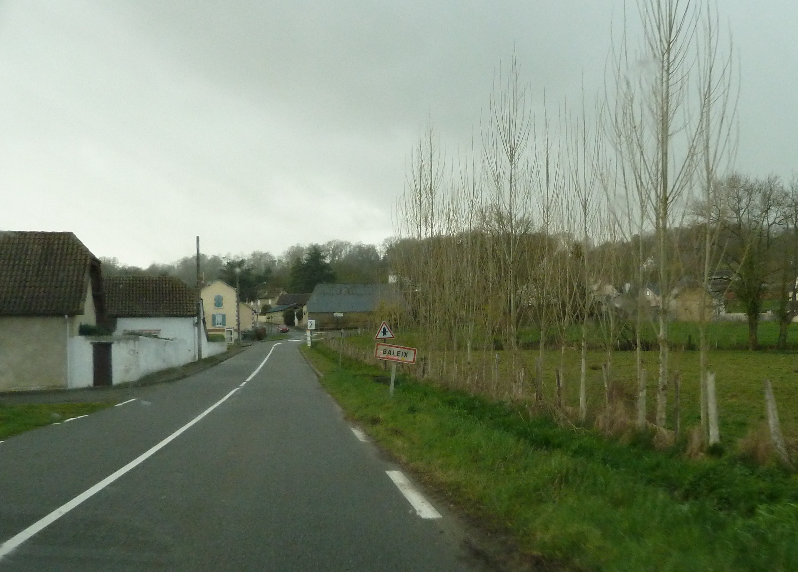 Entrée dans Baleix